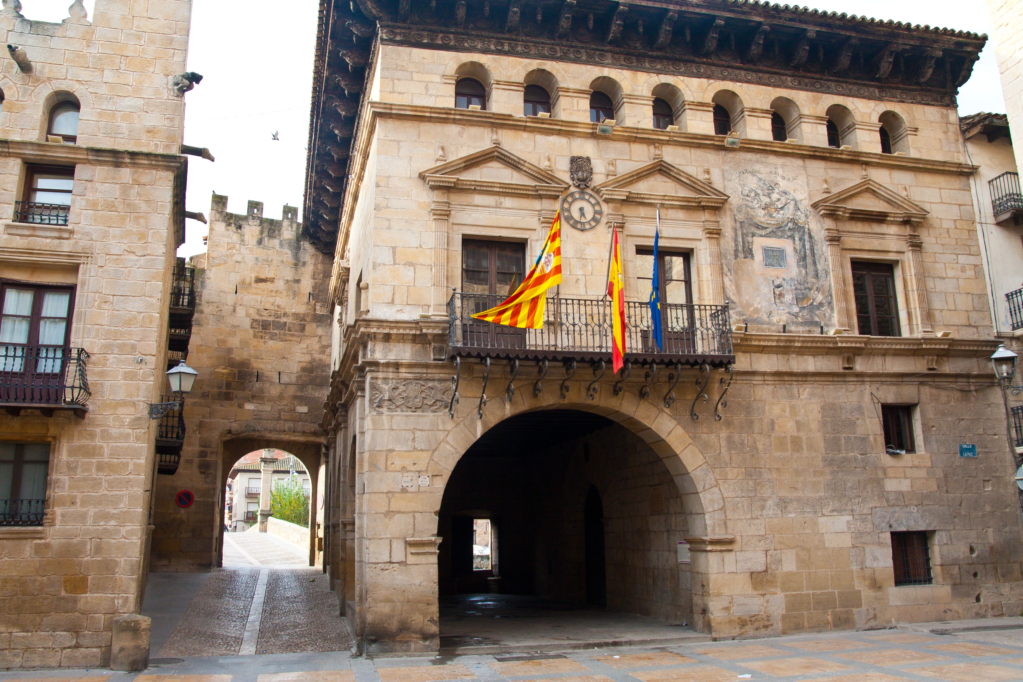 Ajuntament (Valderrobres)